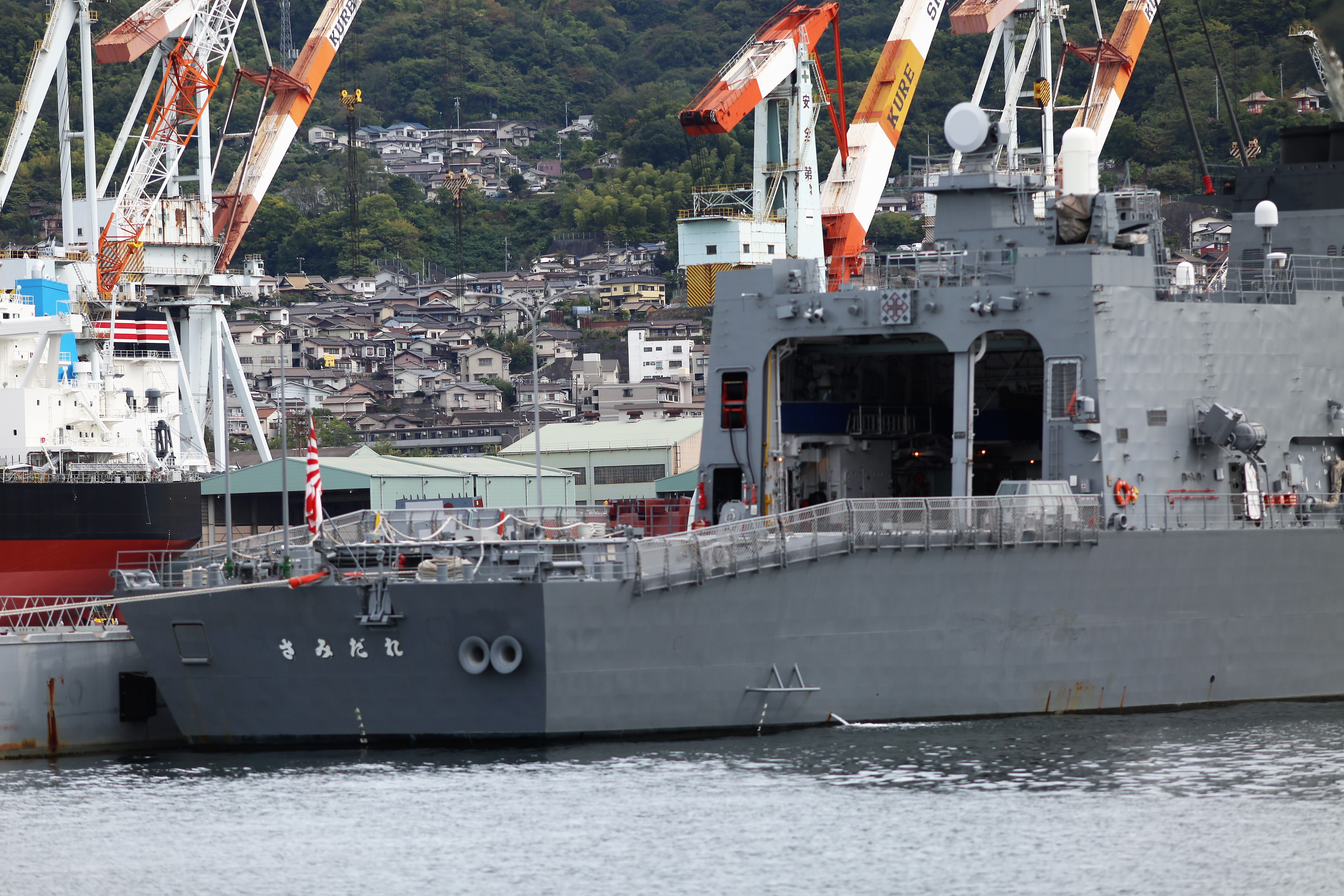 護衛艦さみだれの艦尾。デコイ発射孔と、ヘリ格納庫が見える。艦尾甲板の斜面は「オランダ坂」と呼ばれた。海上自衛隊呉基地での撮影。